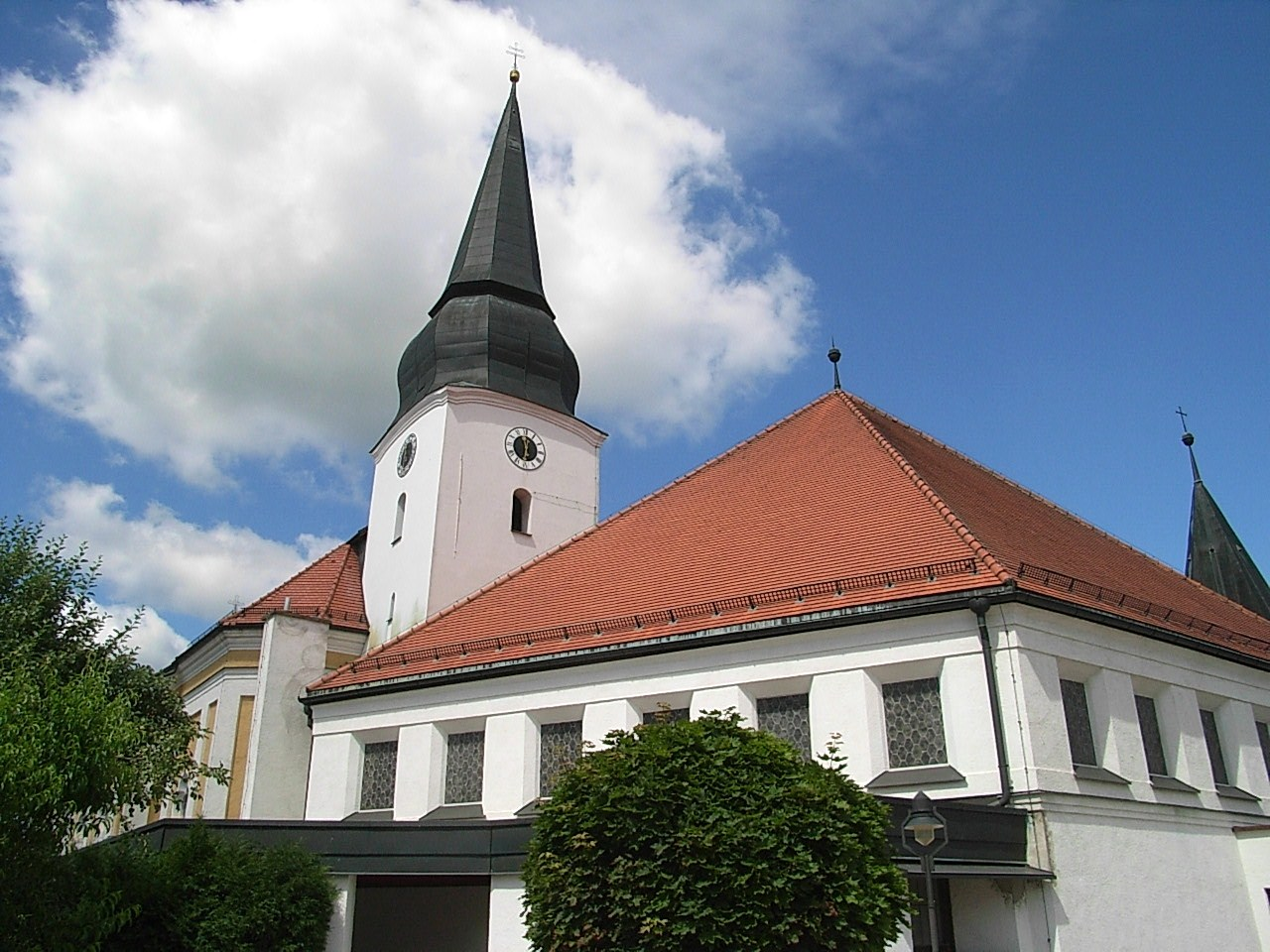 Pfarrkirche St. Bartholomäus in Simbach bei Landau